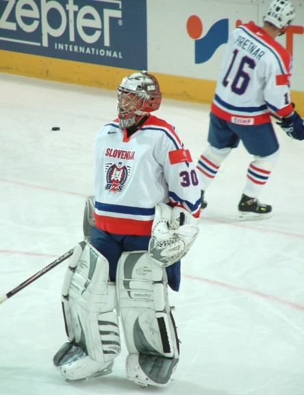 Slowenischer Nationaltorwart Gaber Glavic bei der WM 2005